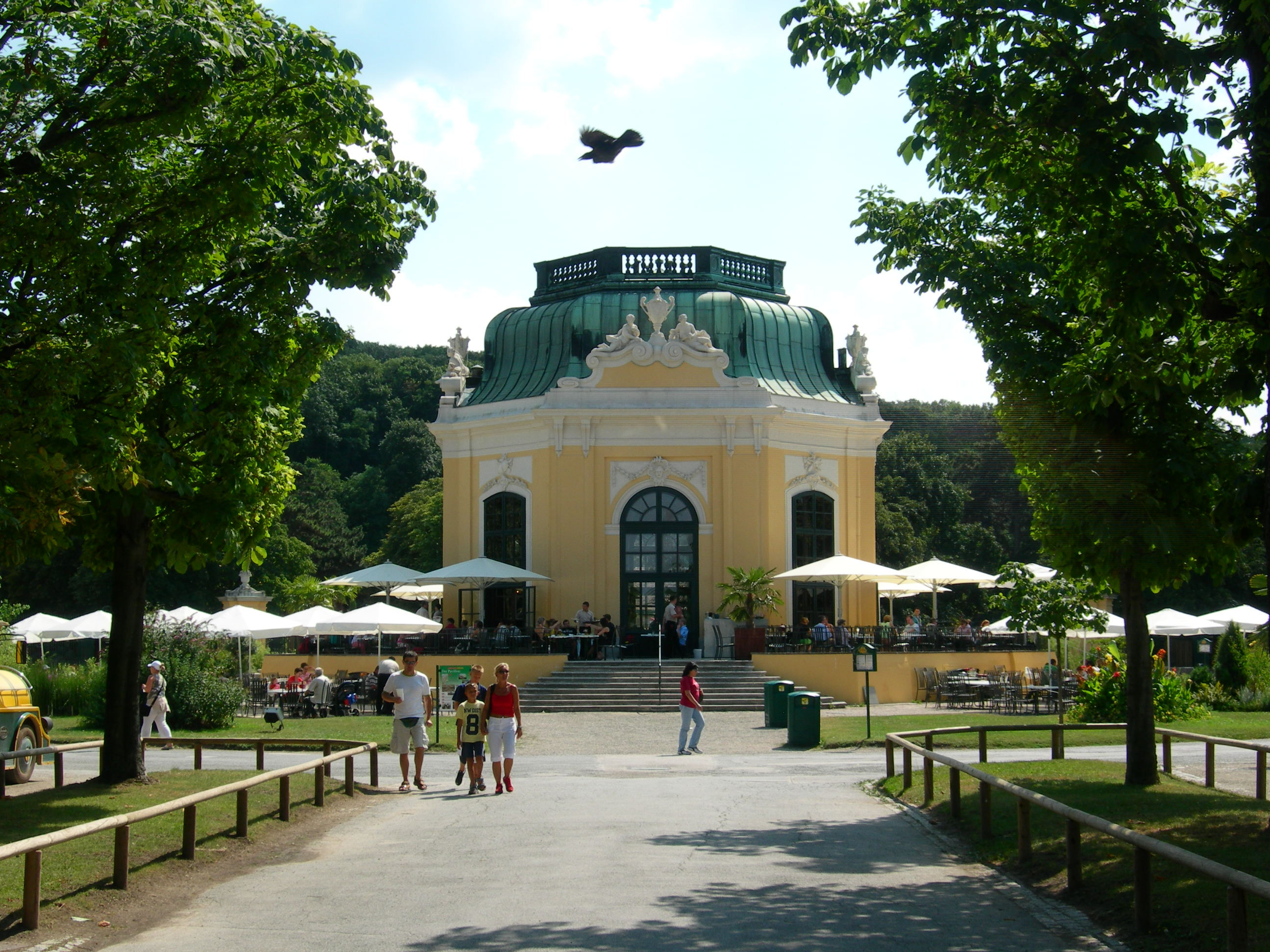 Kaiserliches Pavillon, Schloss Schönbrunn